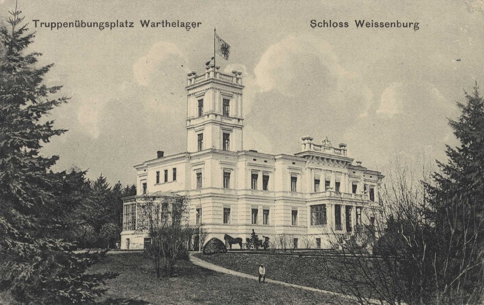 Schloss Weissenburg auf dem Truppenübungsplatz Warthelager bei Posen, Deutsches Kaiserreich.